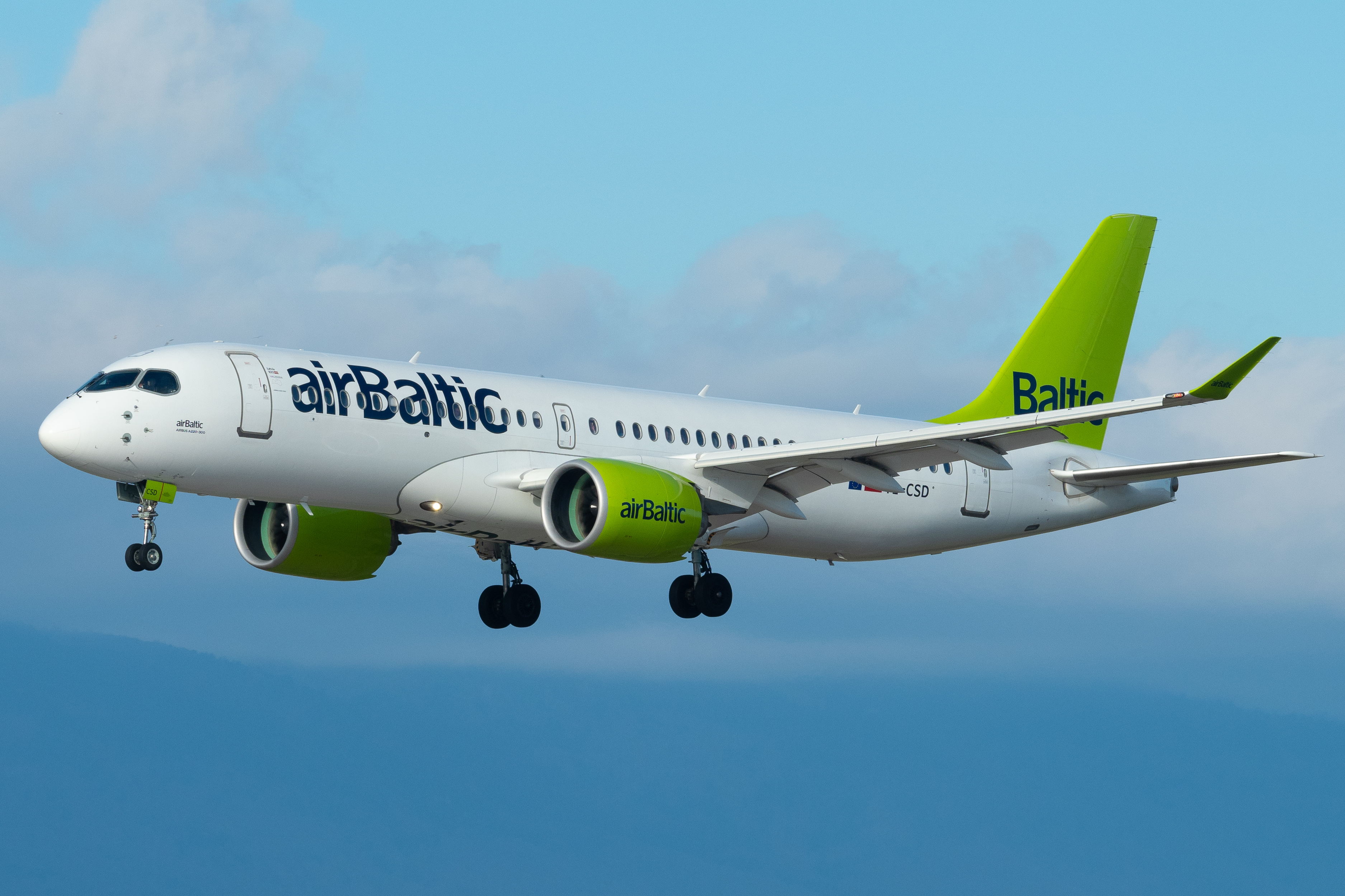 GVA Bois Brûlè